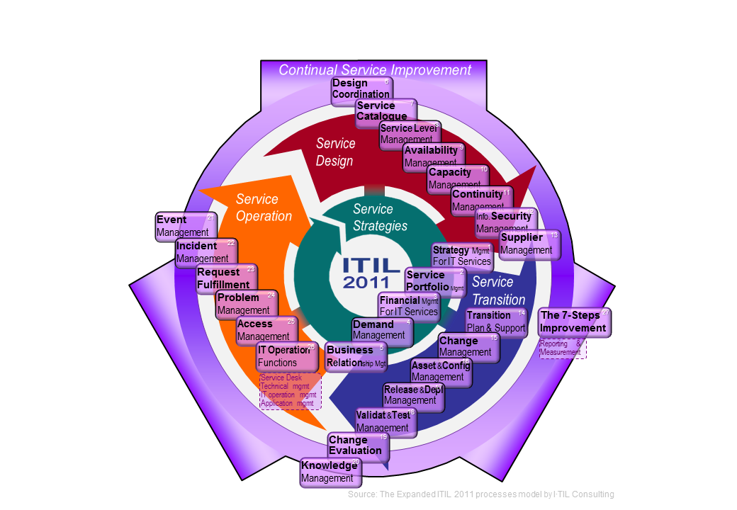 תיאור גרפי של תהליכי העבודה של מתודת ITIL 2011